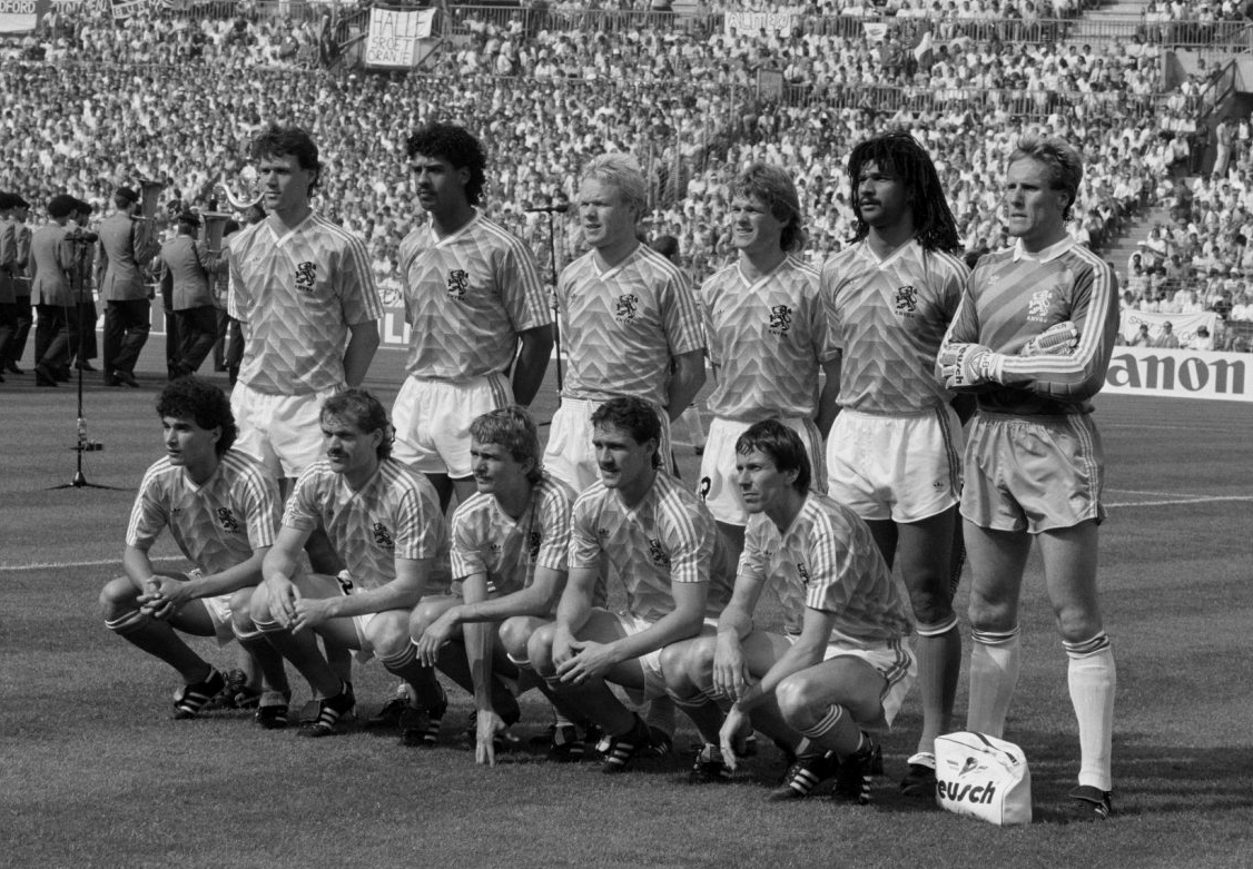 EK voetbal in West Duitsland; Nederland tegen Ierland 1 Van Basten, Rijkaard, R. Koeman, E. Koeman, Gullit en Van Breukelen